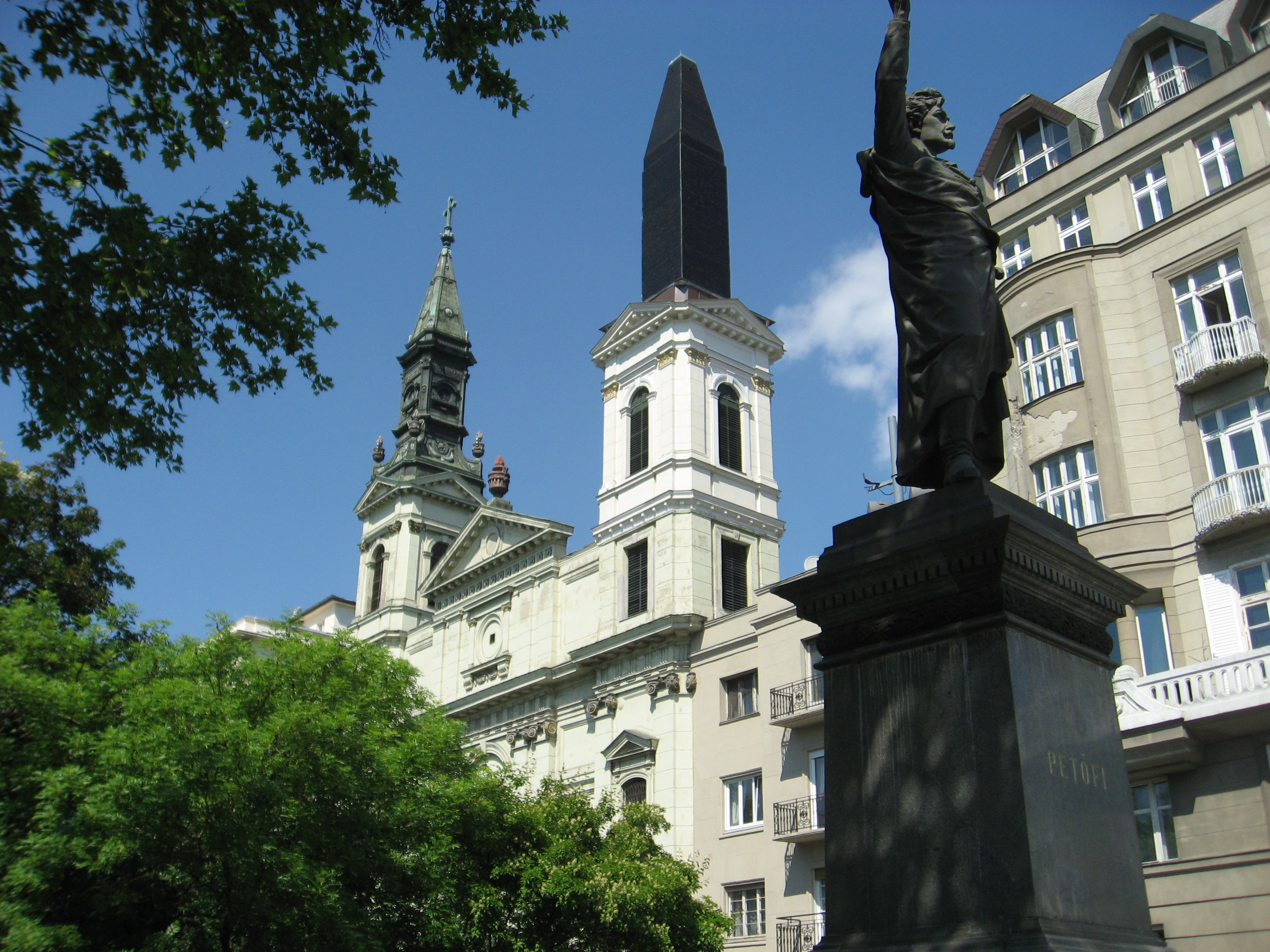 Budapešť